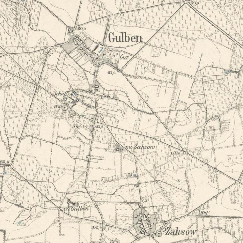 Gulben, Ortsteil der Gemeinde Kolkwitz, Lkr. Spree-Neiße, Brandenburg, Ausschnitt aus dem Messtischblatt 4251 Cottbus West von 1903